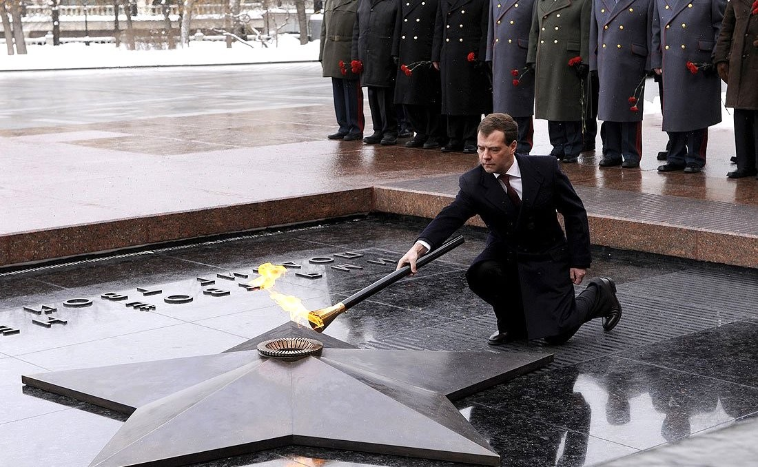 Вечный огонь возвращён на Могилу Неизвестного Солдата у Кремлёвской стены.